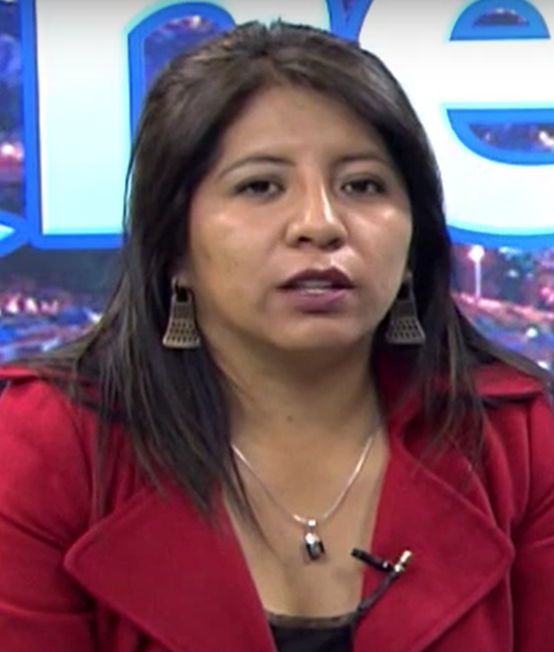 Defensora Nadia Cruz en julio de 2019